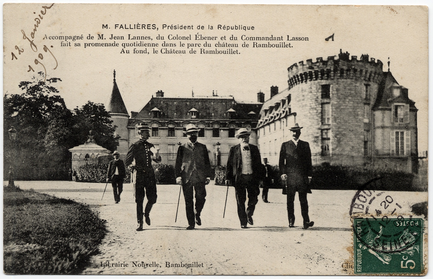 M. Fallières, président de la République. Accompagné de Jean Lannes, du colonel Ebener et du commandant Lasson fait sa promenade quotidienne dans le parc du château de Rambouillet. Au fond le château de Rambouillet.